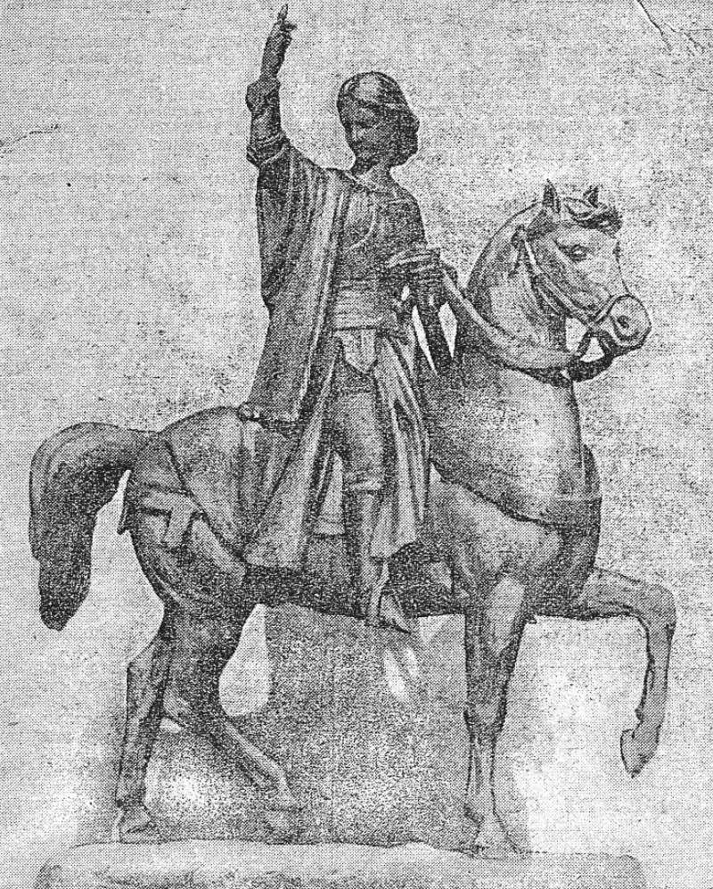 "Maquette de la Jeanne d'Arc de Watrinelle, qui devait être érigée à Vaucouleurs".